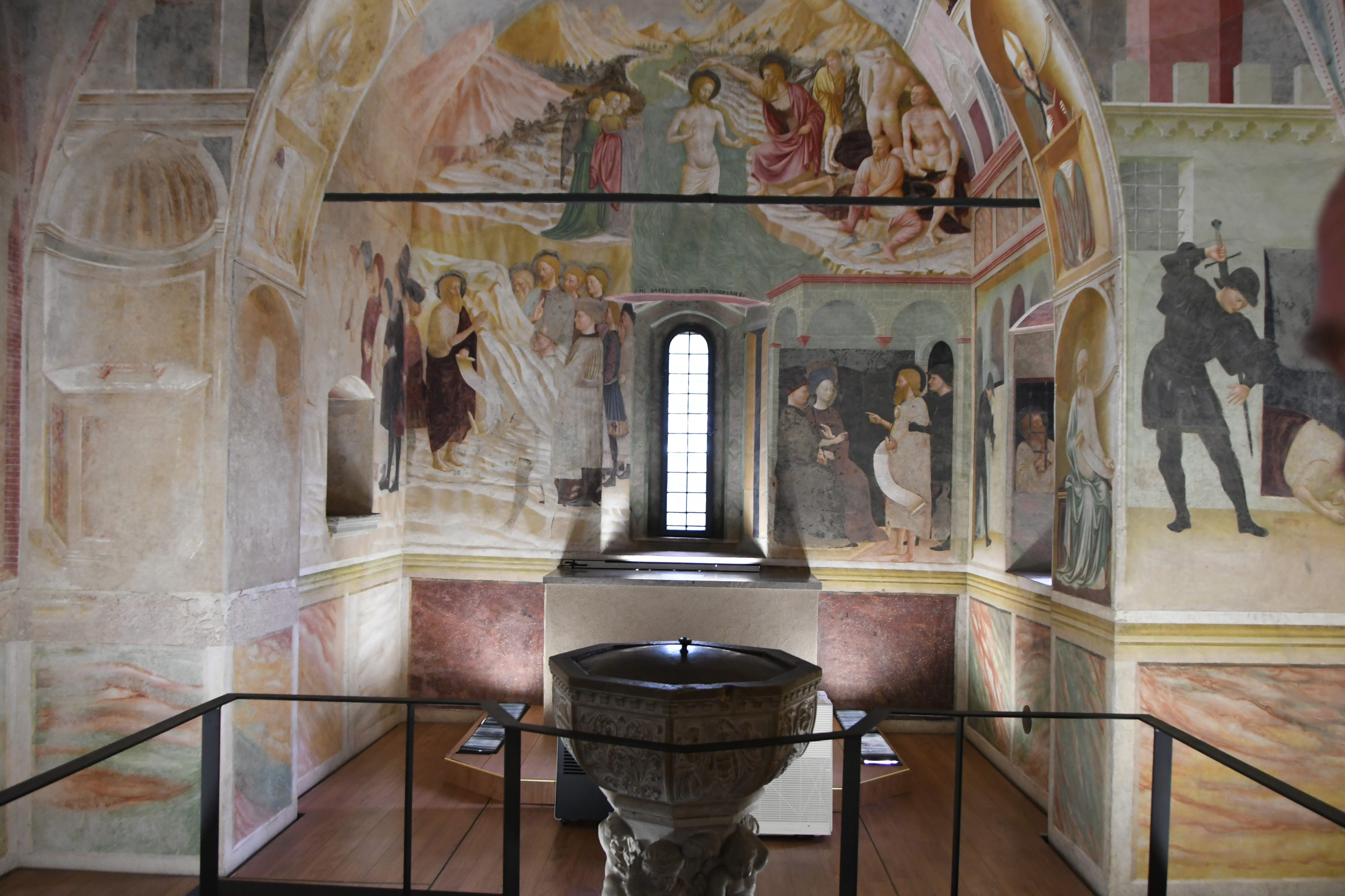 Ciclo di Affreschi con Storie di S. Giovanni Battista nel Battistero della Collegiata di Castiglione Olona (Varese